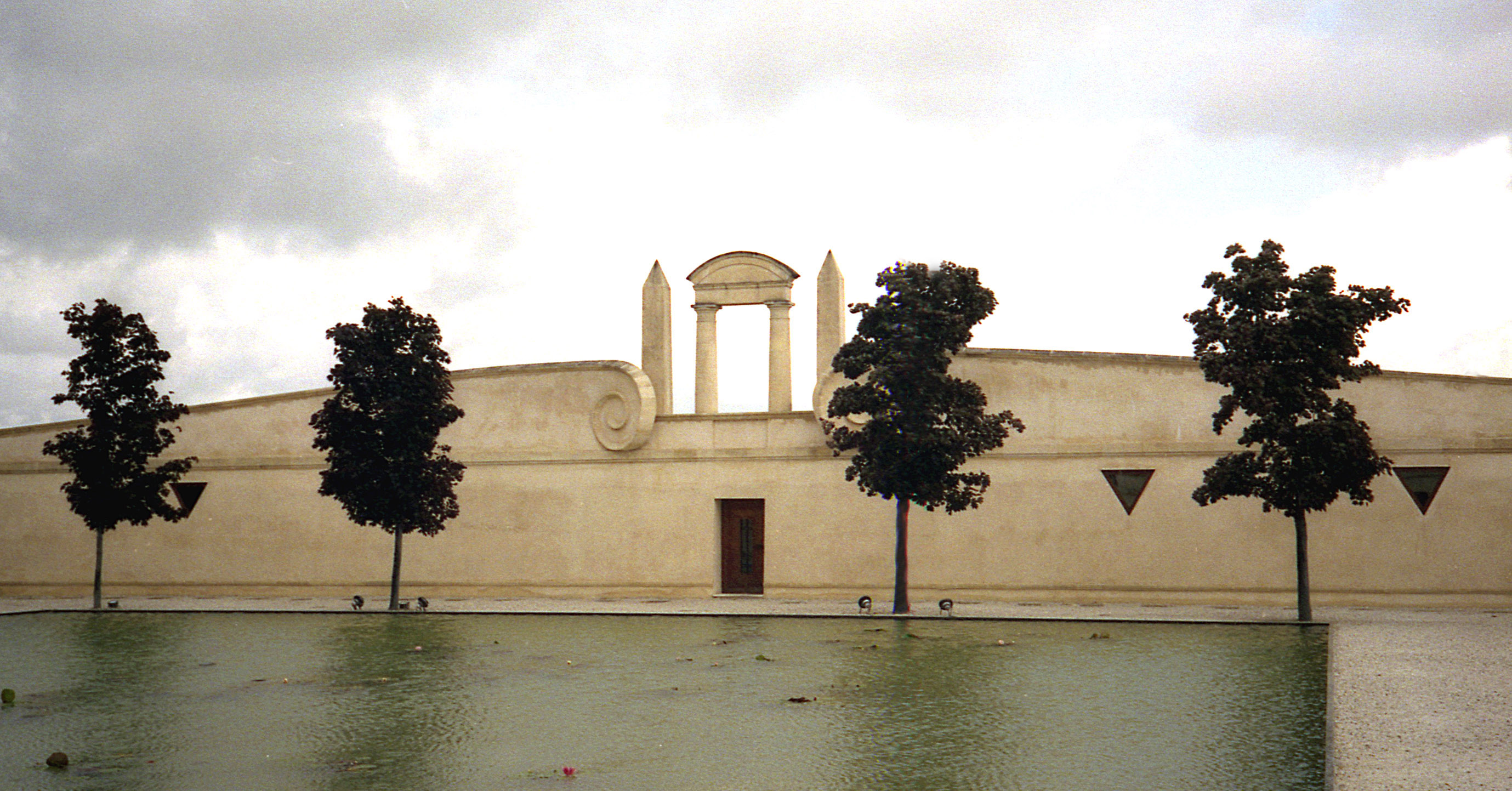 Château Pichon-Longueville-Baron - Pauillac - Bordeaux